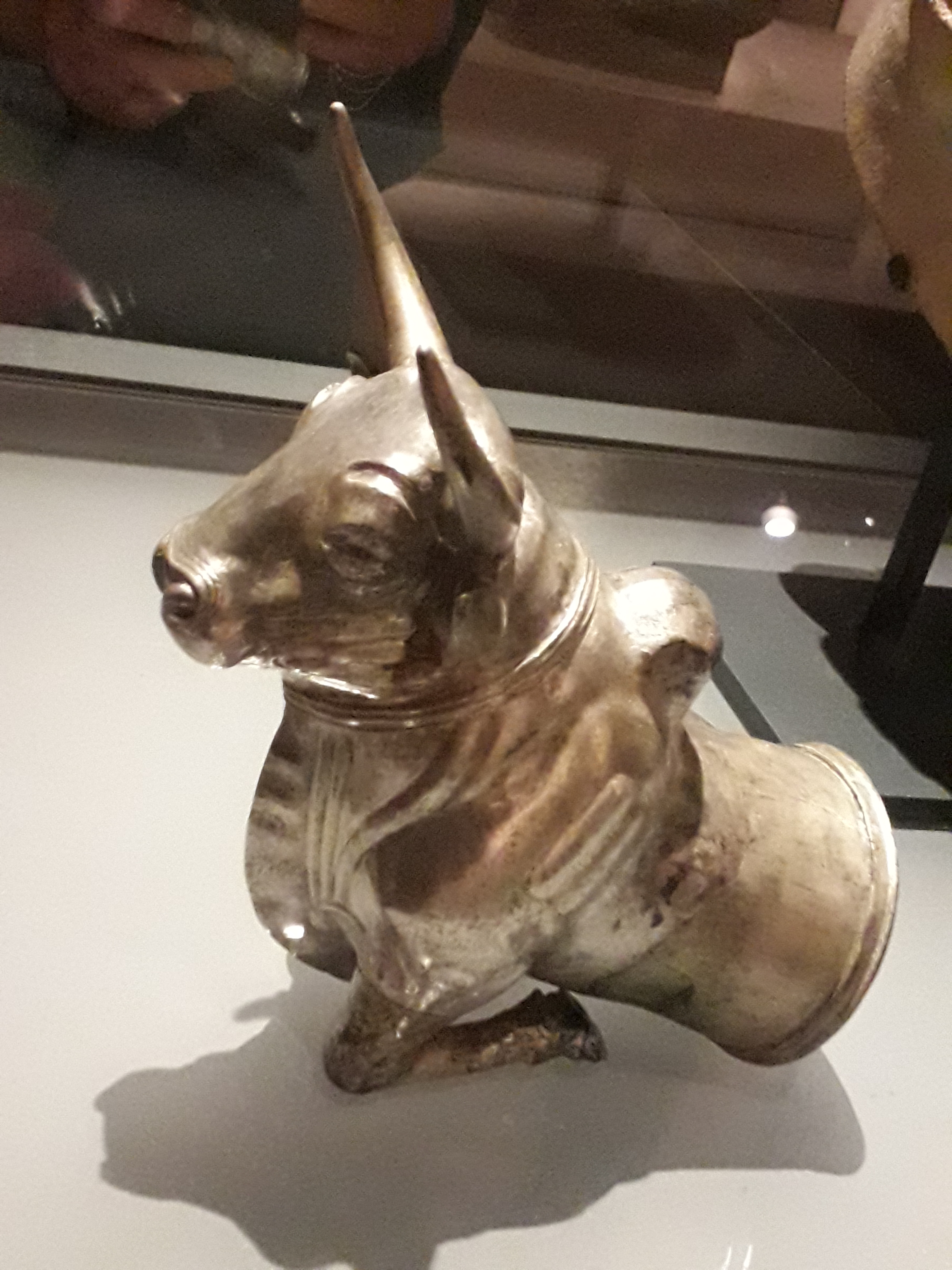 Rhyton hittite en forme de taureau. Vue de profil depuis le côté gauche. Argent. Anatolie centrale (actuelle Turquie). Epoque de l'empire hittite. 1400-1200 avant J.-C. New York, Metropolitan Museum of Art. Gift of Norbert Schimmel Trust, 1989. 1989.281.1. Ce rhyton a été fabriqué à partir de deux plaques d'argent. Il représente l'avant-train d'un taureau. Les rhytons sont des vases à boire. Ce type de vase était très à la mode dans l'empire hittite. Il permettait aussi de remplir des fonctions religieuses, par exemple pour faire des libations, c'est-à-dire verser un liquide sur l'autel d'une divinité ou au pied de sa statue. Exposé au Musée du Louvre en 2019 pour l'exposition "Royaumes oubliés".